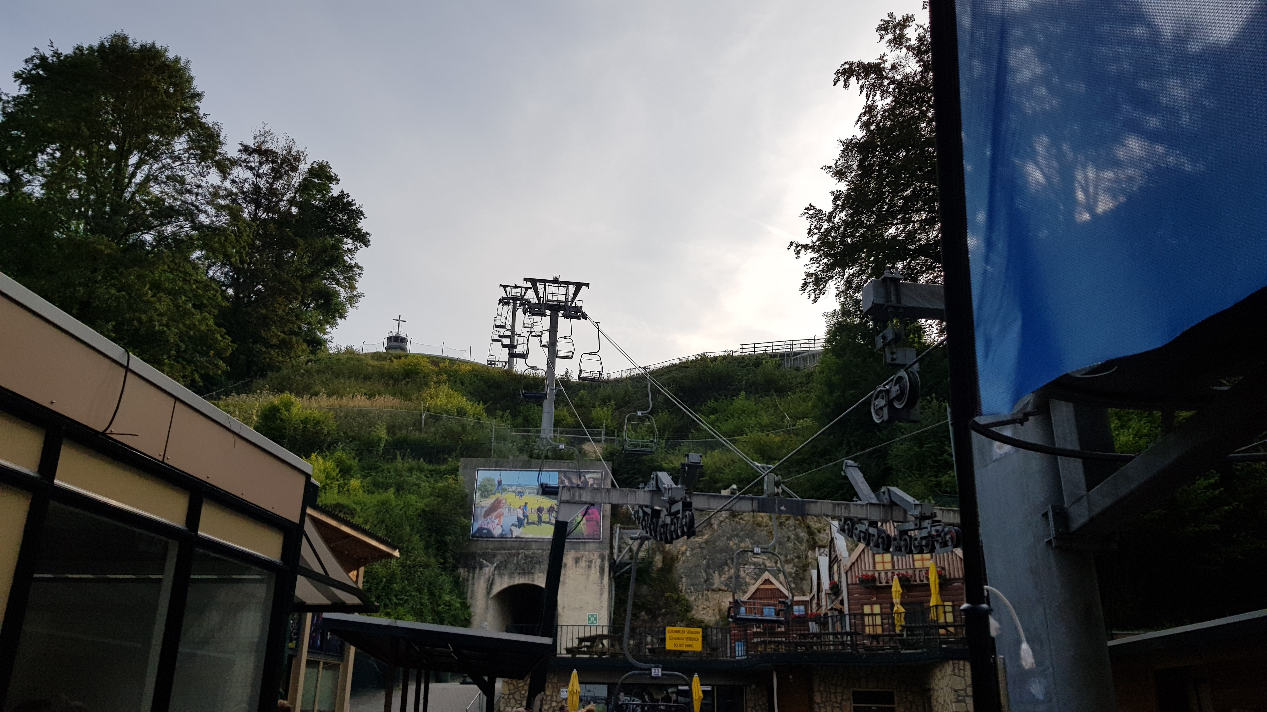 Wilhelminagroeve, Valkenburg, Nederland